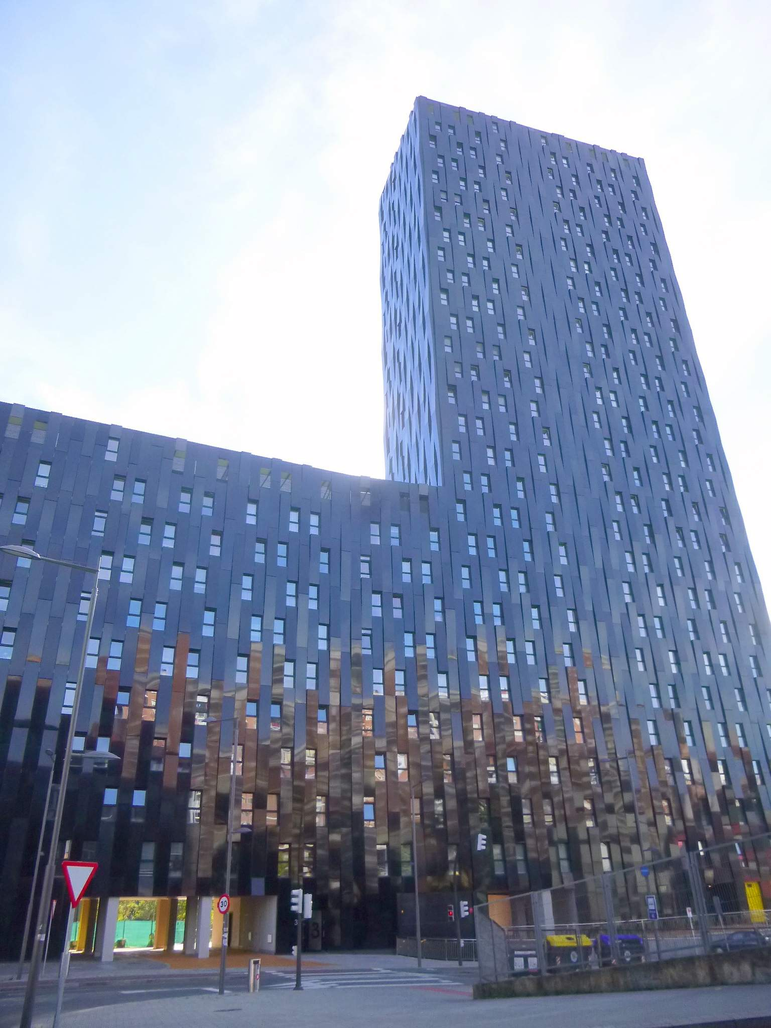 Torres de Bolueta (Bilbao)